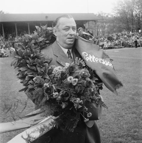 Helsingborgs IF:s ordförande John "Bill" Pettersson hyllas före matchen mellan HIF och GAIS.